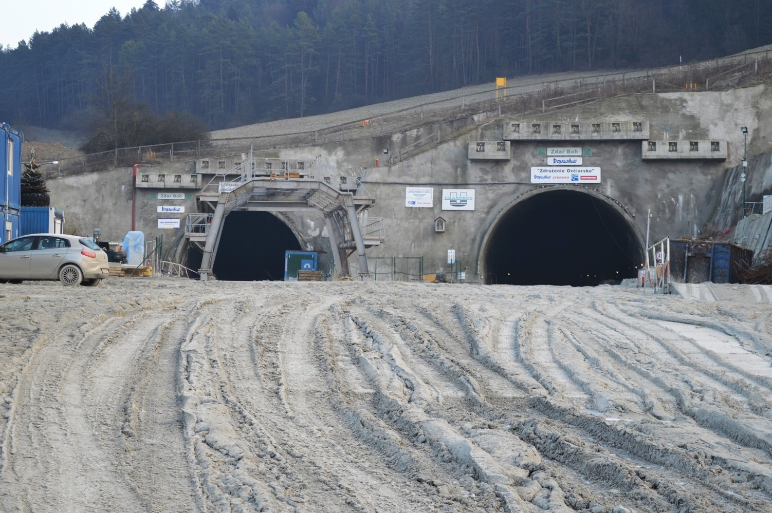 ovciarsko